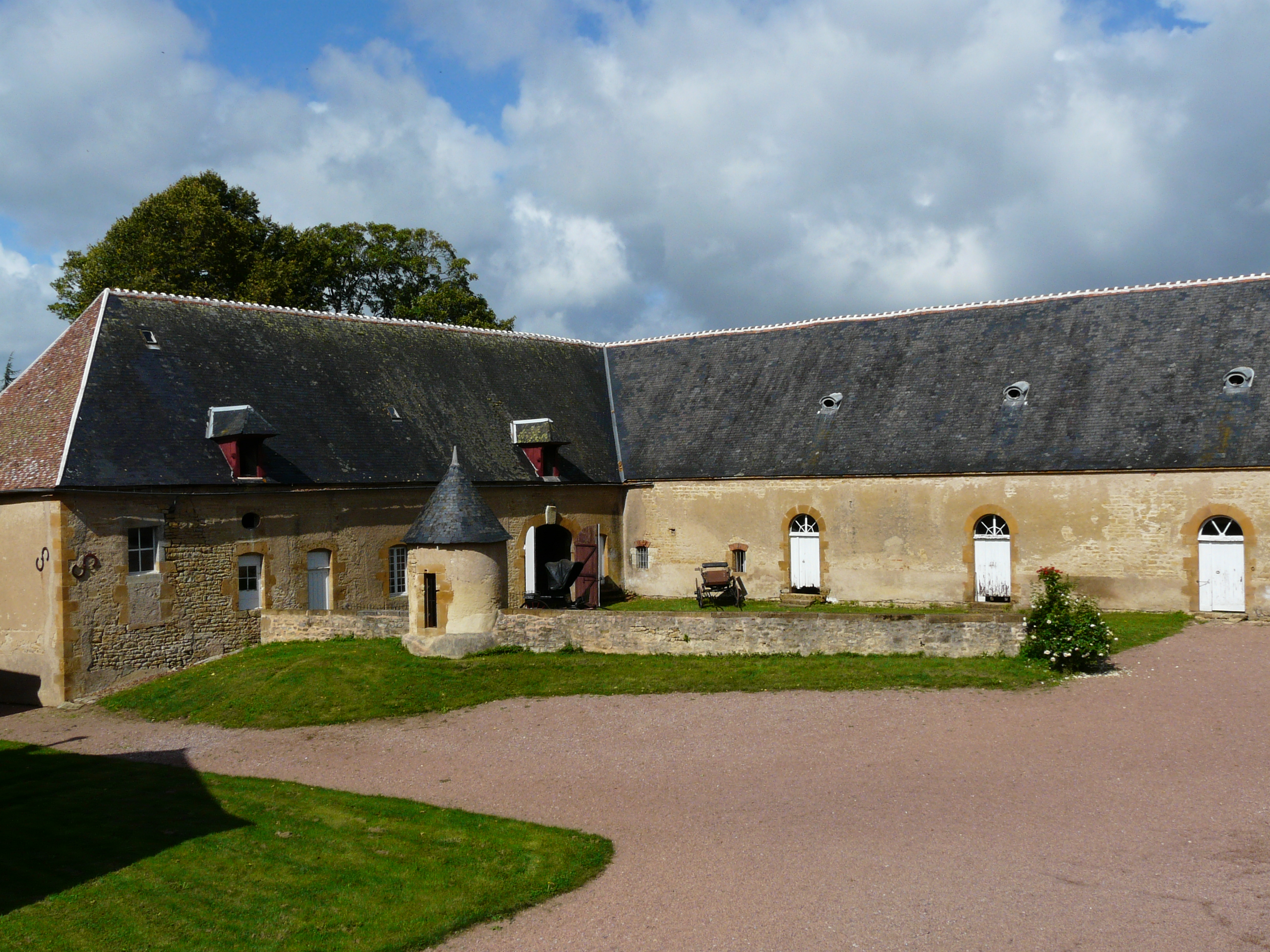 Communs du château de Villemolin, détail